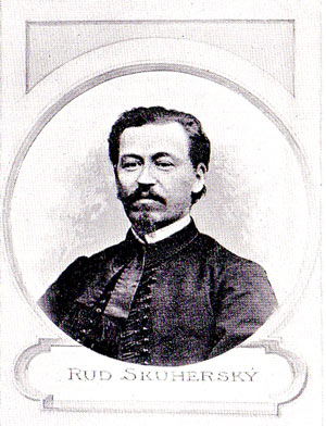 Rudolf Skuherský